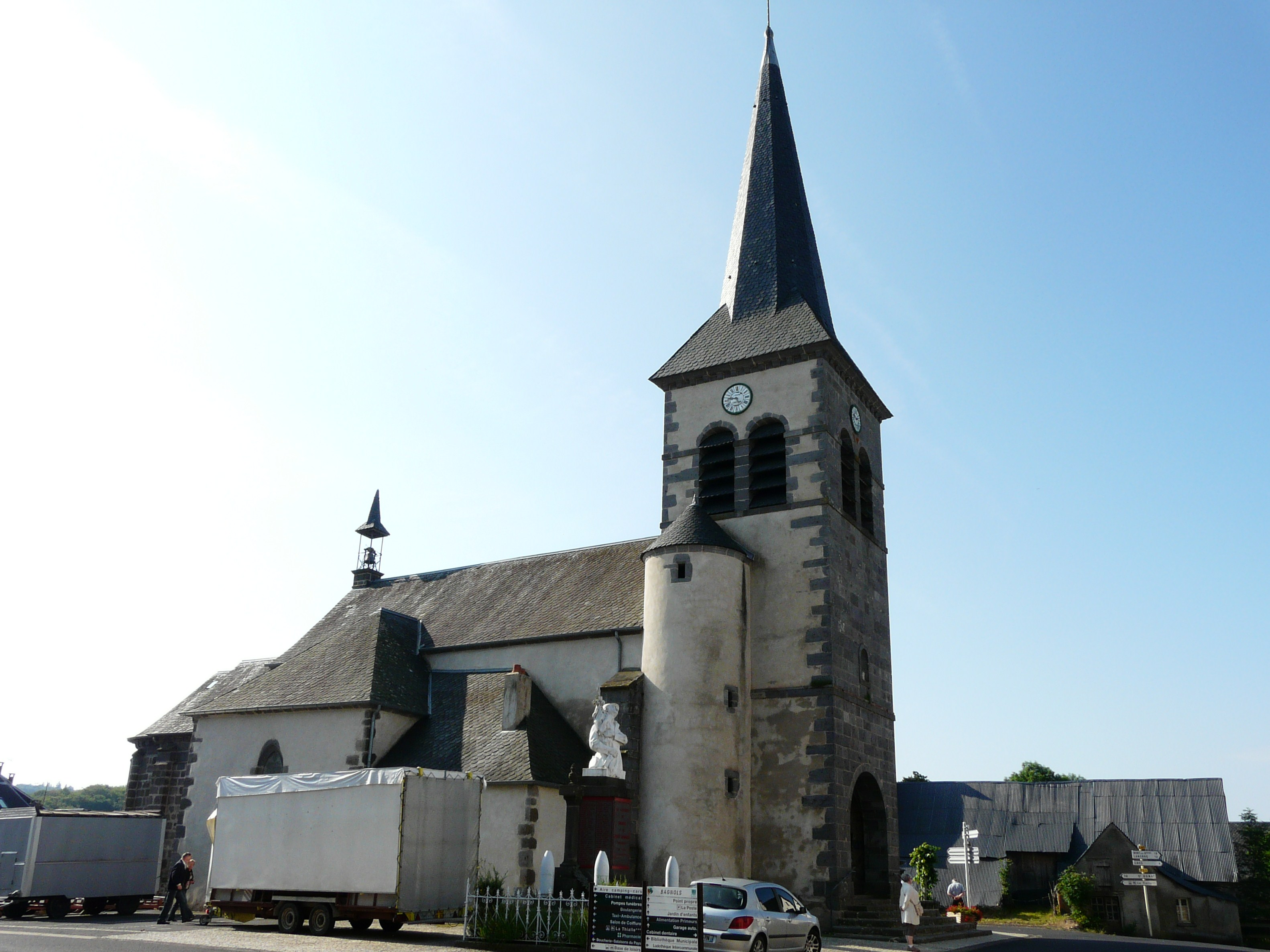 L'église Saint-Pierre de Bagnols, Puy-de-Dôme, France.